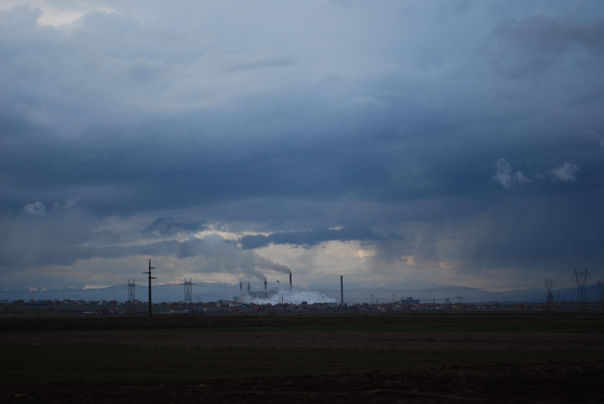 A power plant in Kastriot/Obilić, Kosovo.